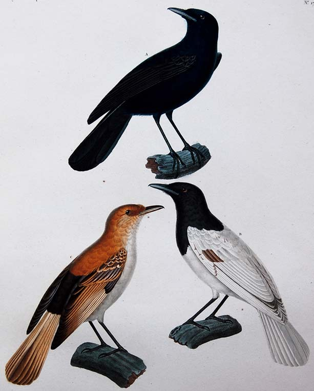 Plate 17 from Voyage autour du monde, exécuté par Ordre du Roi, Sur la Corvette de Sa Majesté, La Coquille, pendant les années 1822, 1823, 1824 and 1825 (7 vols. Arthus Bertrand, Paris) By Louis Isidore Duperrey & René-Primevère Lesson (1825-1830).